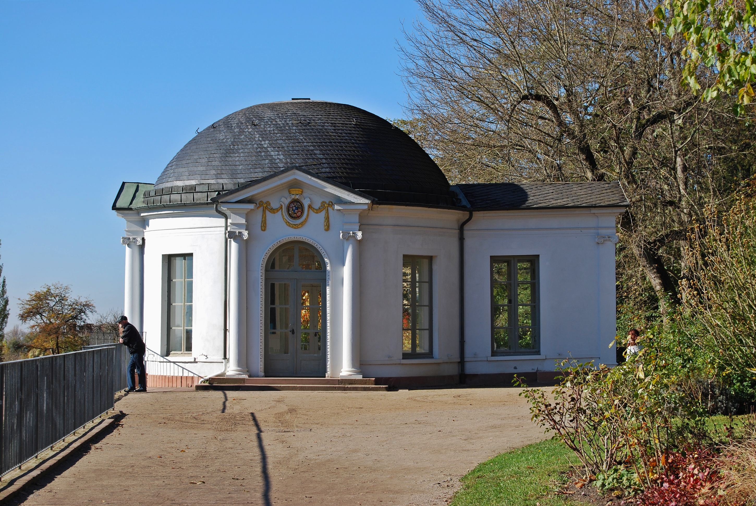 Der Frühstückstempel im Aschaffenburger Schlossgarten, Unterfranken.